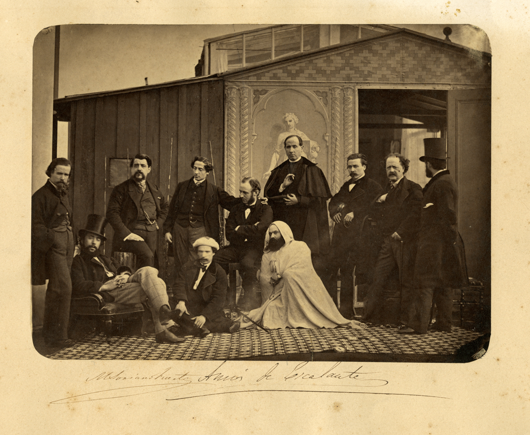 Escalante, Velasco, Alarcón con otros artistas españoles en el estudio de Altobelli y Molins. Roma, enero de 1861.